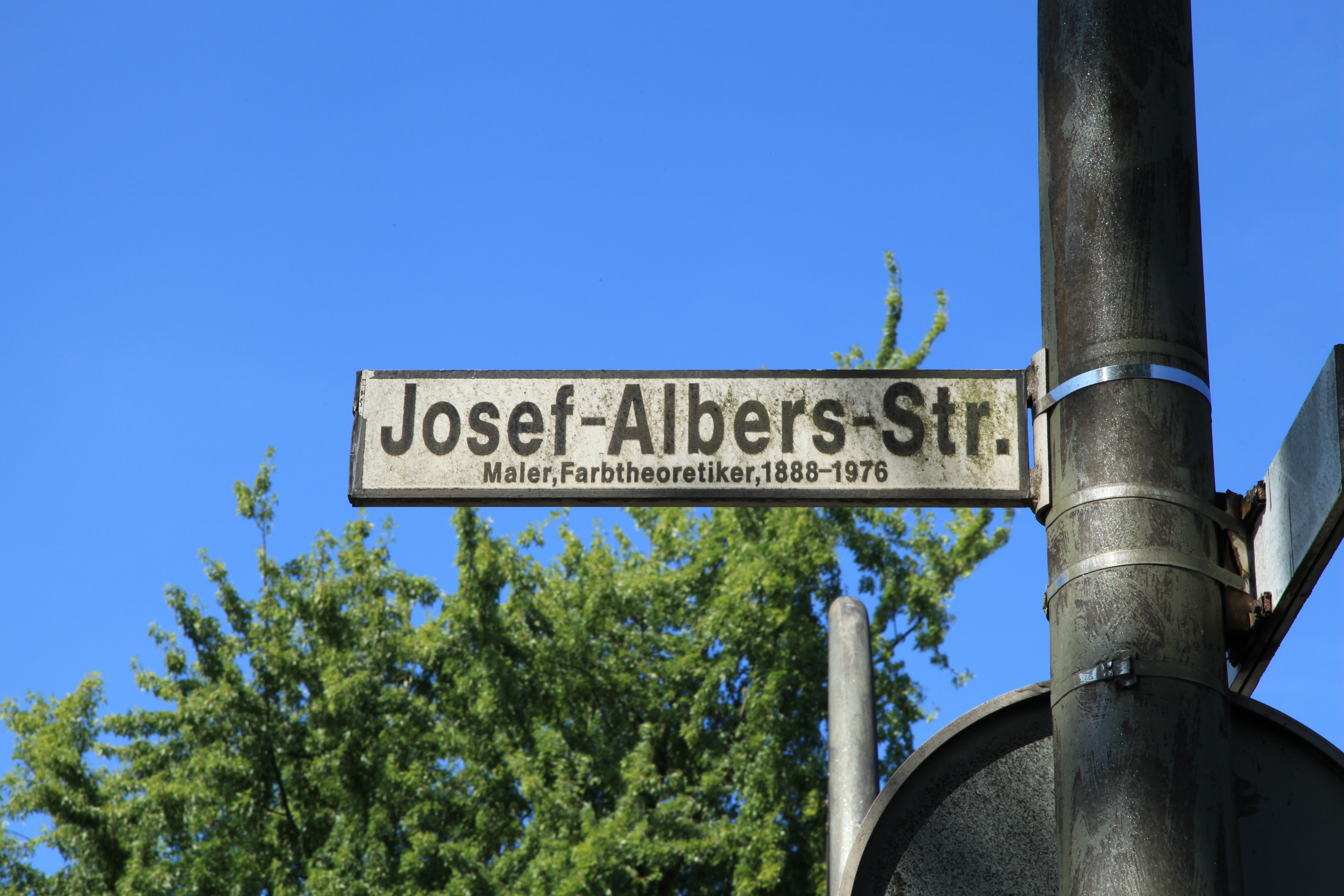 Josef-Albers-Straße in Bottrop